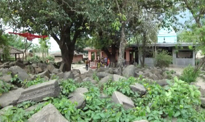 नेपाली: मुर्तिया सर्लाही जिल्लामा अवस्थित छ